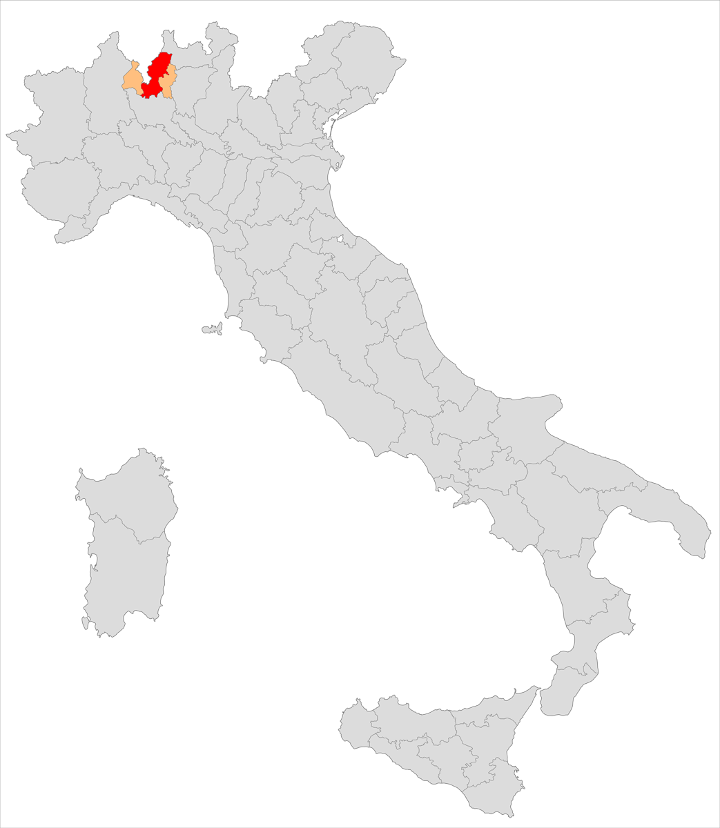 Il circondario di Como nella provincia omonima (1859-1927)